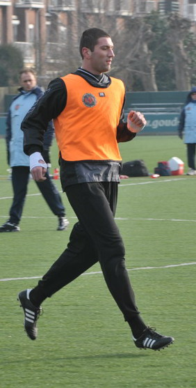 Bogdan Milic, een Montenegrijnse spits. Dit seizoen voor het eerst bij ADO. Nog niet snel genoeg voor onze Eredivisie.